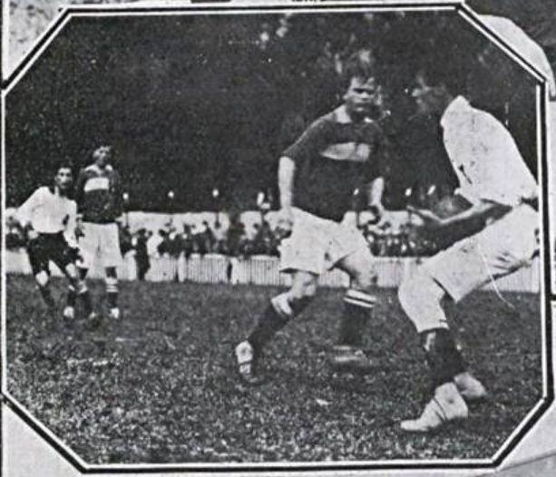 Detalhe da 3ª partida realizada entre o Corinthians Paulista e o Palestra Italia, terminada em 3 a 3. A partida marcou a estréia do novo escudo do Corinthians e a inauguração do Estádio da Ponte Grande.